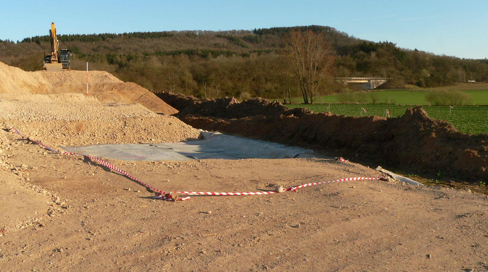 Ausgrabungsstelle Grubenhaus bei Afferde